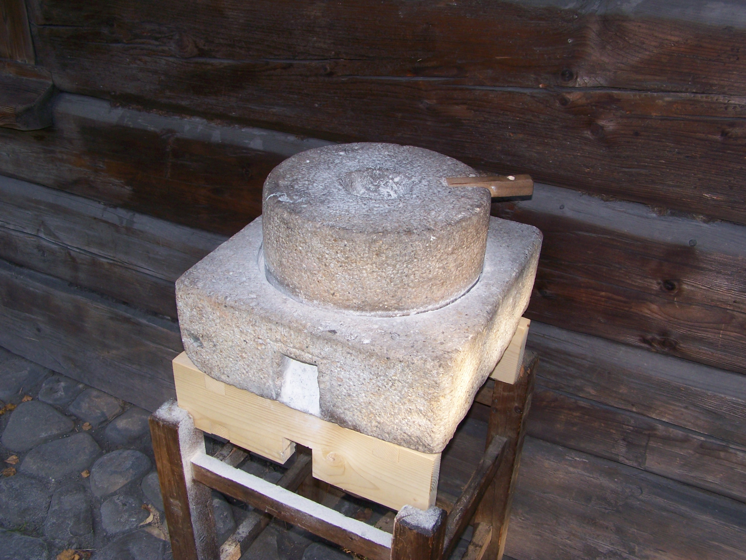 Zdjęcie przedstawia kamienne żarna.